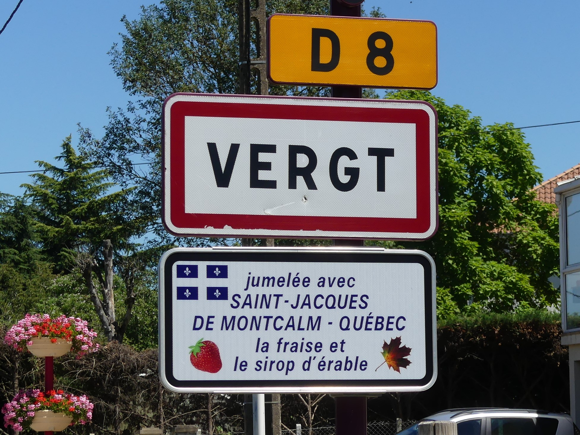 Panneau de jumelage de Vergt, Dordogne, France.